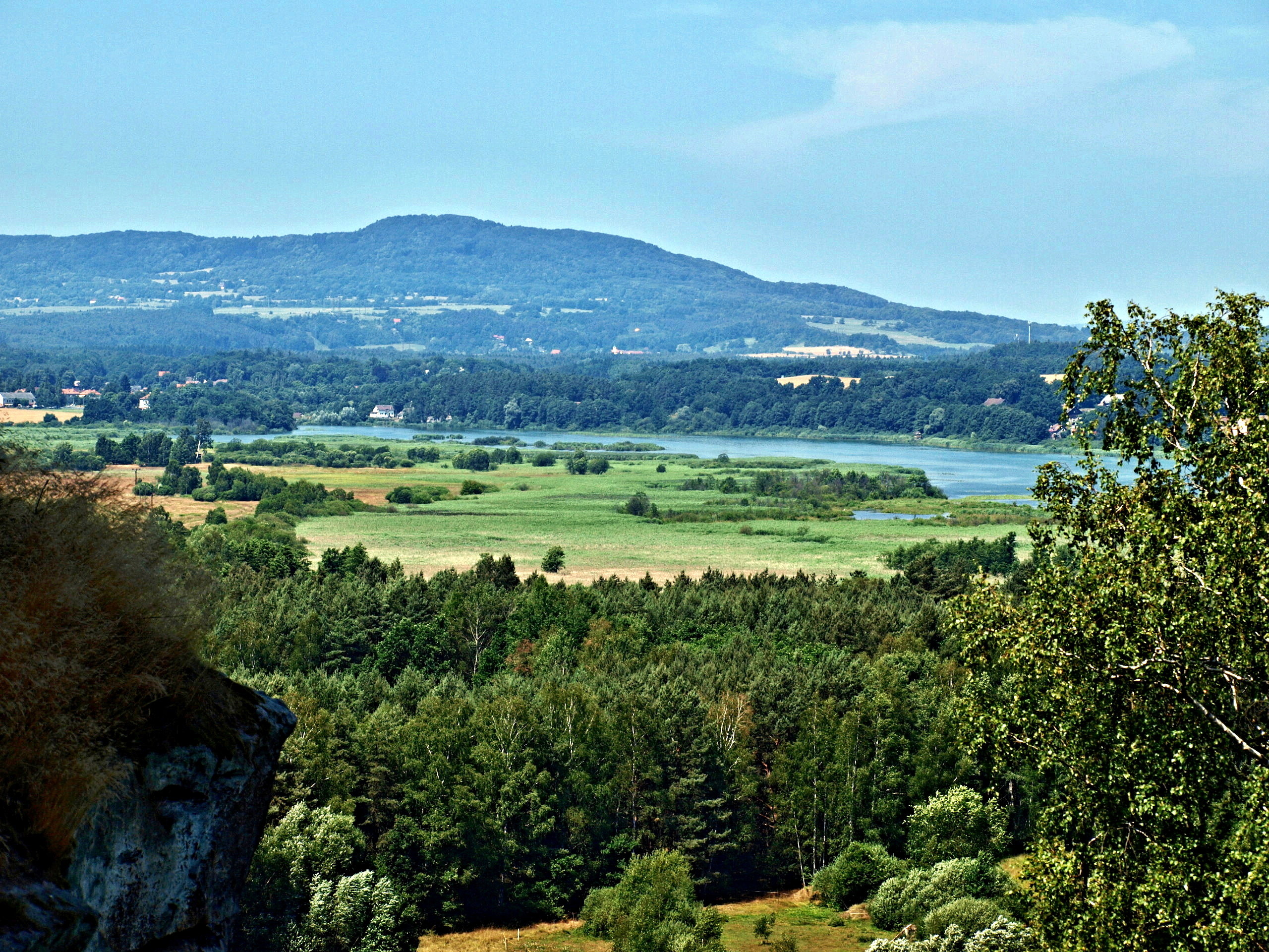 Jestřebí